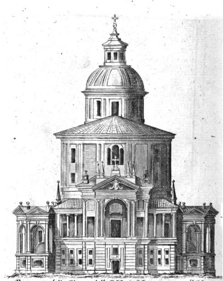 Prospetto della Chiesa della B.V. di S. Luca posta sul Monte della Guardia di Bologna.